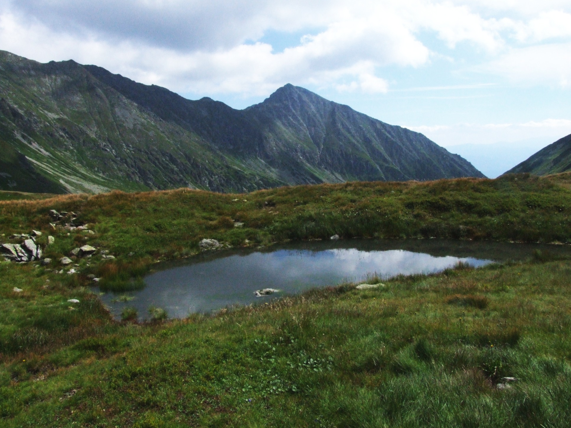 Gaborowy staw (największy) w Dolinie Gaborowej (Tatry Zachodnie)